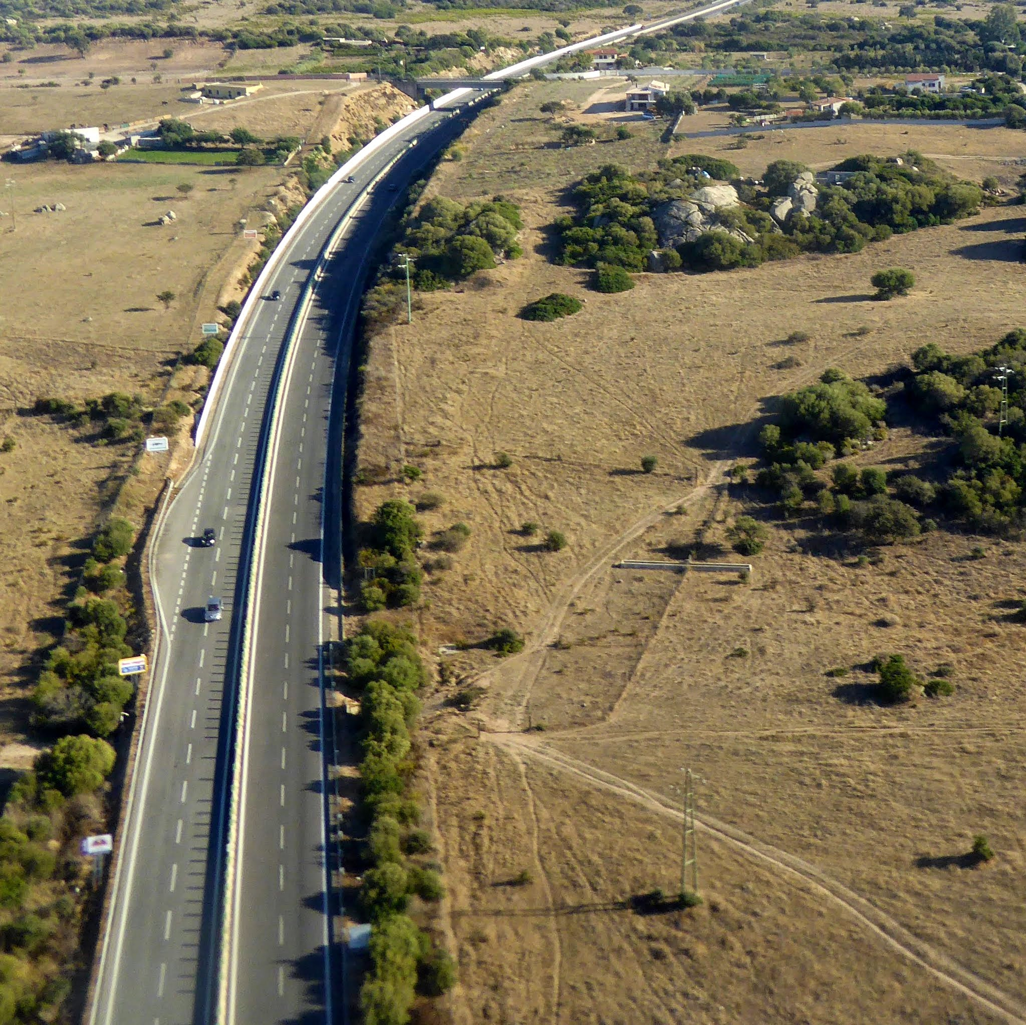 Tangenziale Ovest di Olbia, Sardinien, Italy